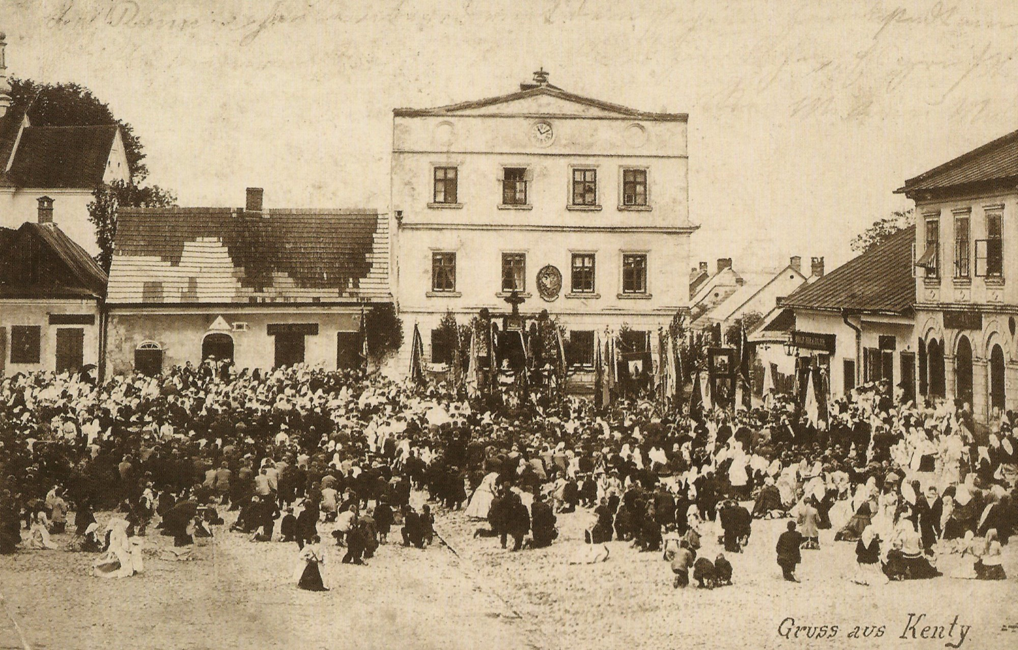 Kęty, Rynek, Magistrat, Procesja Bożego Ciała